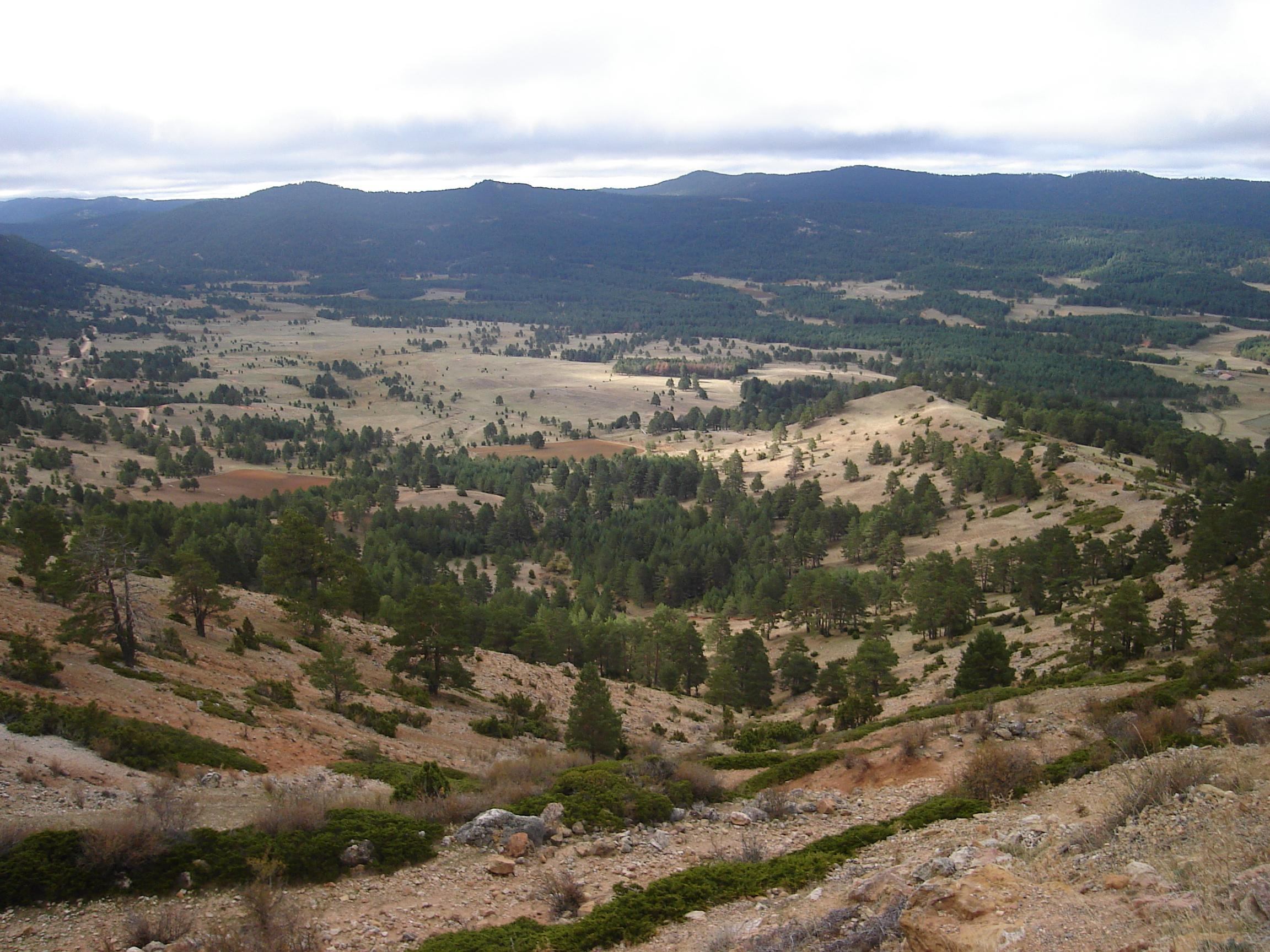 Vega del rio Tajo desde el Puerto el Portillo (1790 m), en el término de Guadalaviar. Se encuentra dentro de los Montes Universales, entre la Sierra de Albarracin y la Serranía de Cuenca.